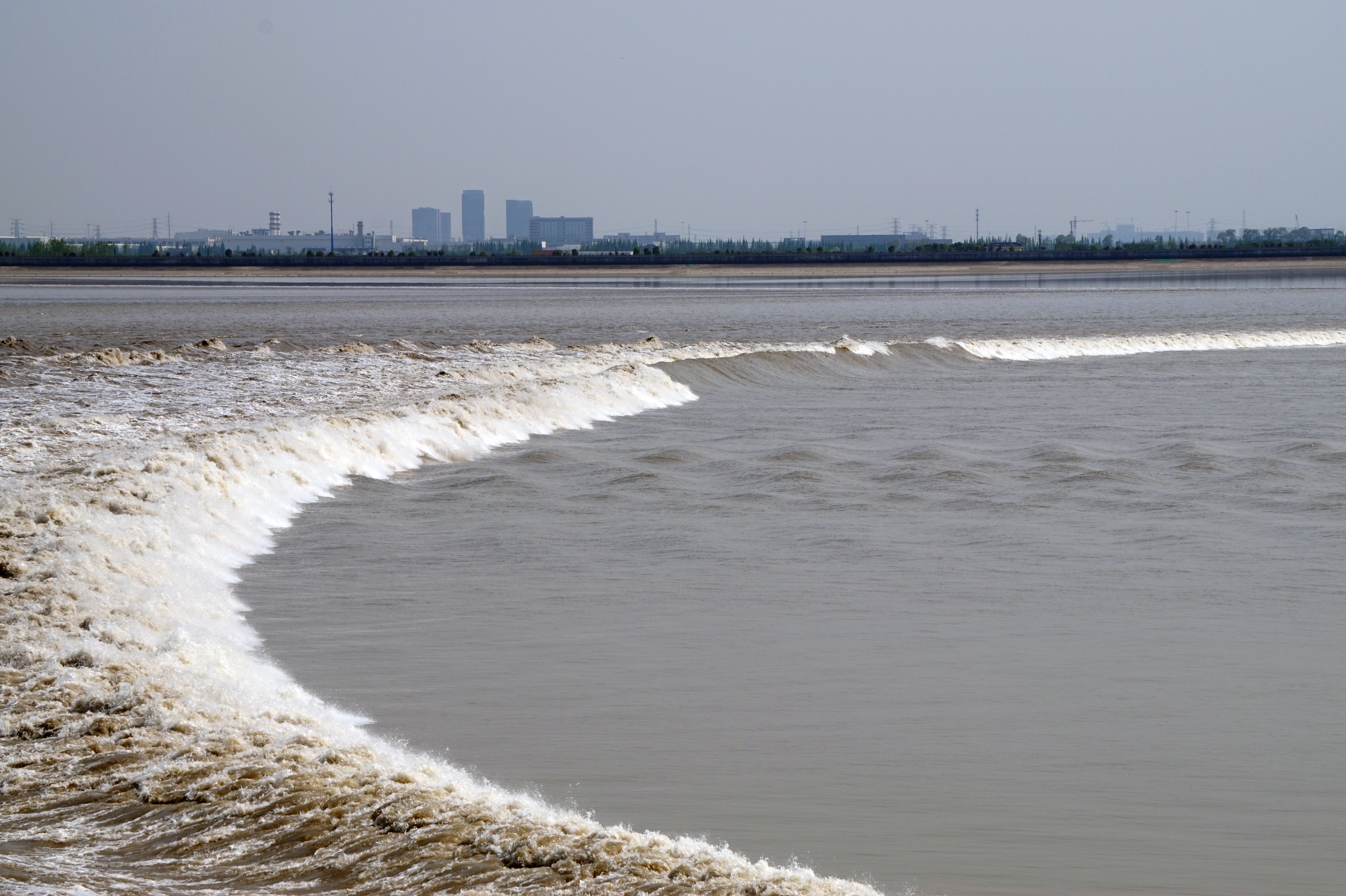 盐官一线潮。